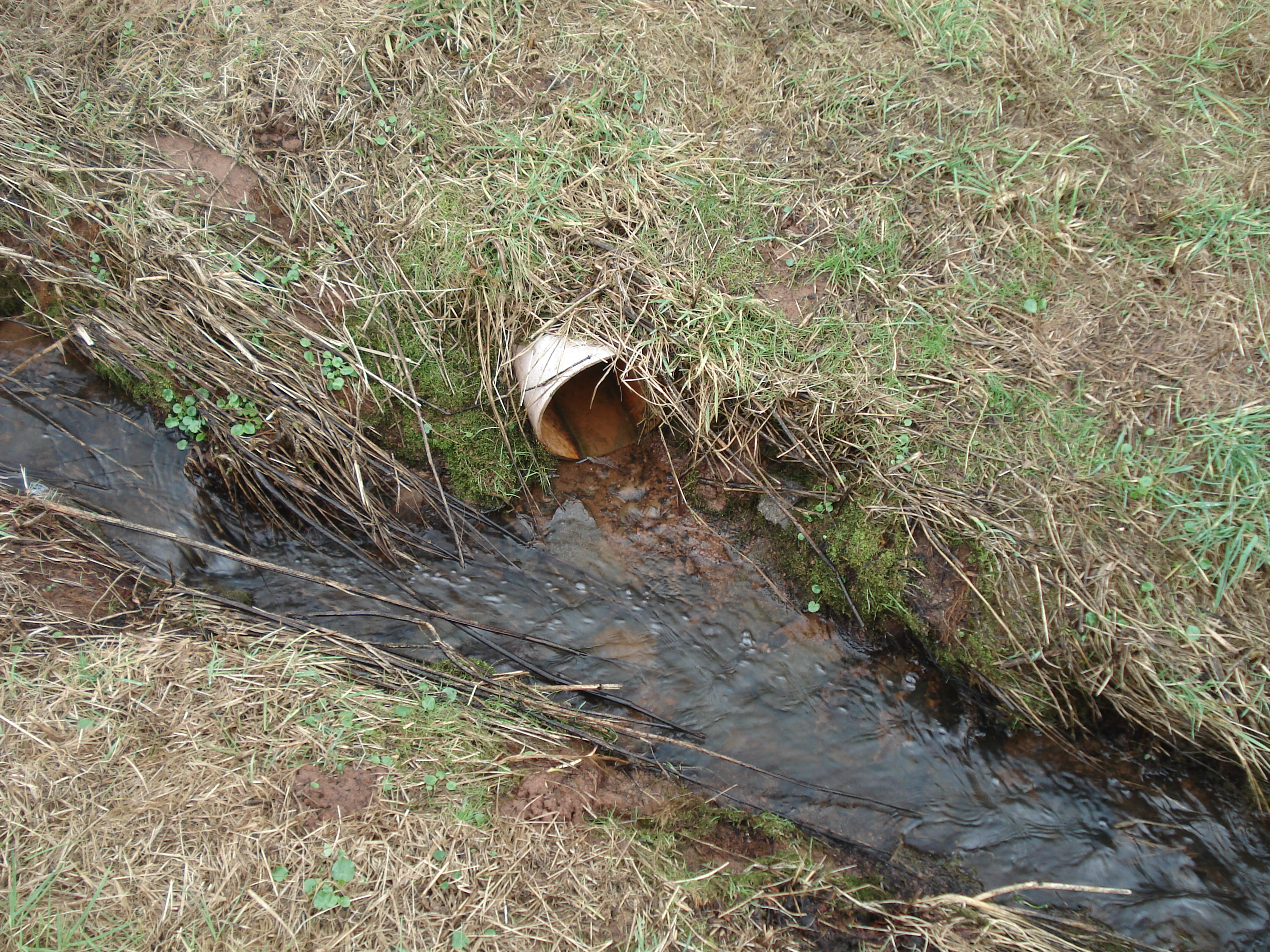 Der Zieglersbrunnen in der Nähe der Ziegelhütte bei Westerngrund ist die Quelle des Rotermichsbach